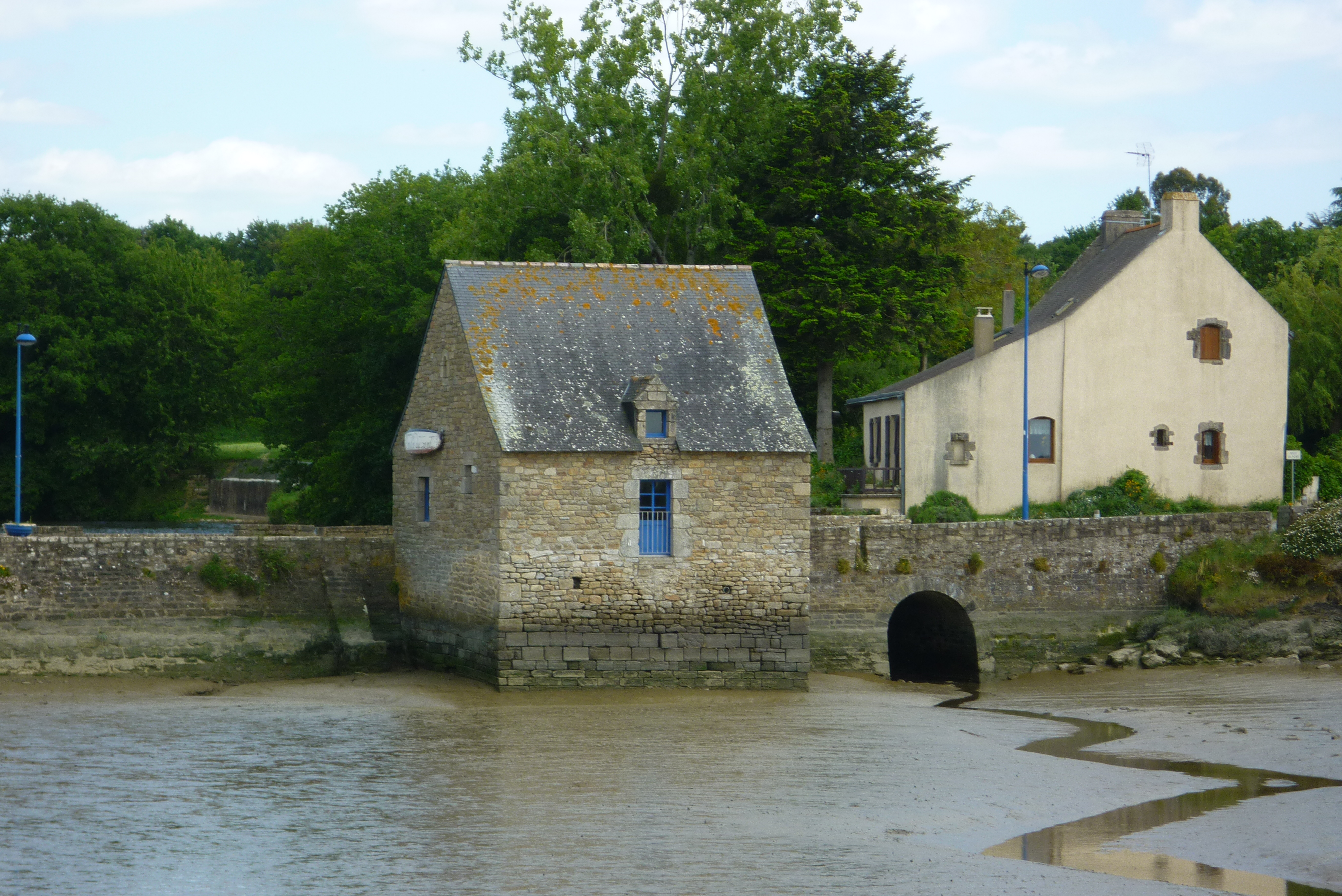 Moulin à marée de Kerentreh, à Noyalo